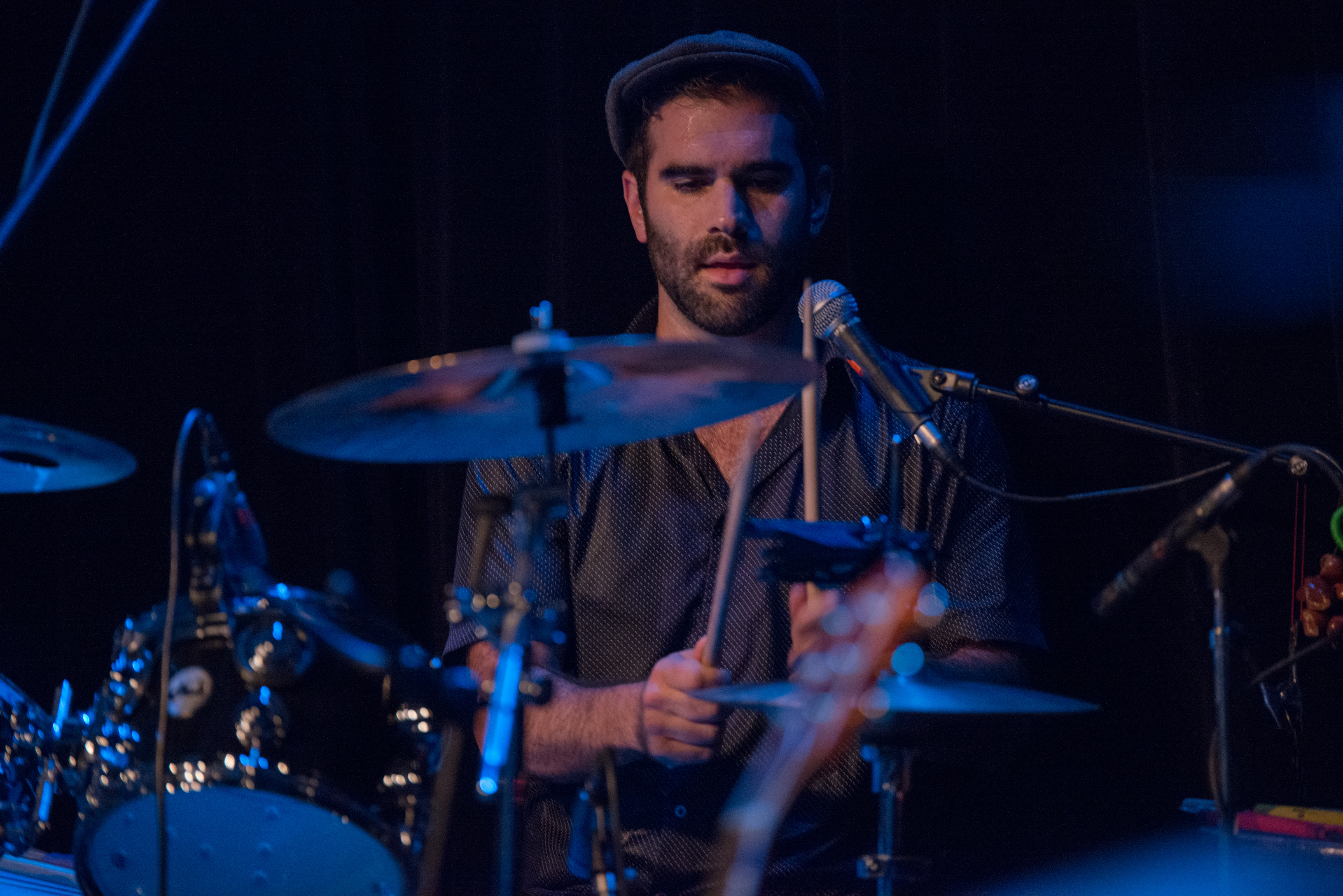 de